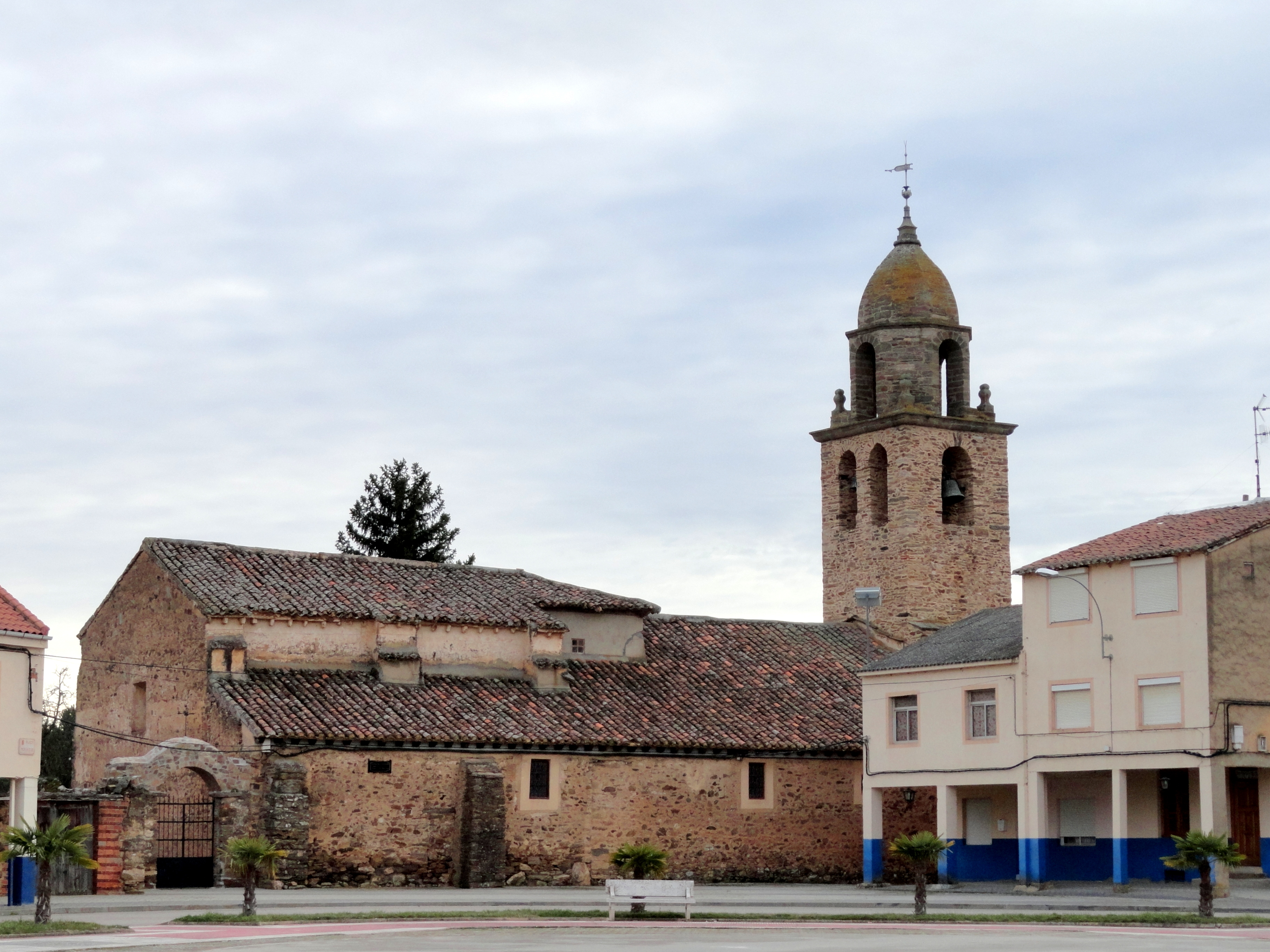 Iglesia de San Verísimo en Alija del Infantado (León).